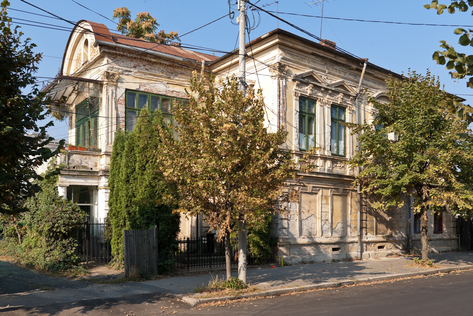 Fotografia prezinta casa Balota vazuta dinspre E.